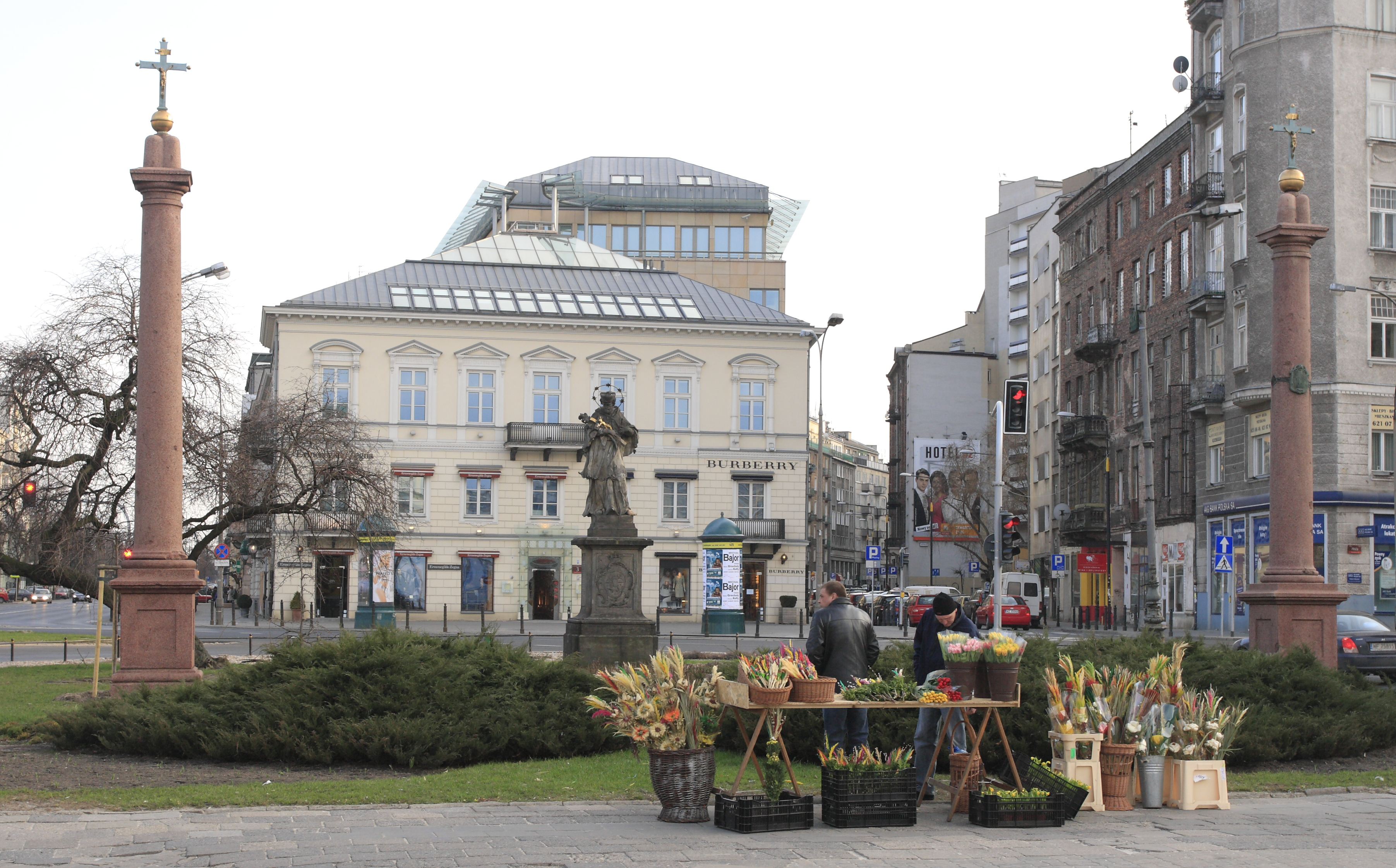 Plac Trzech Krzyży w Warszawie